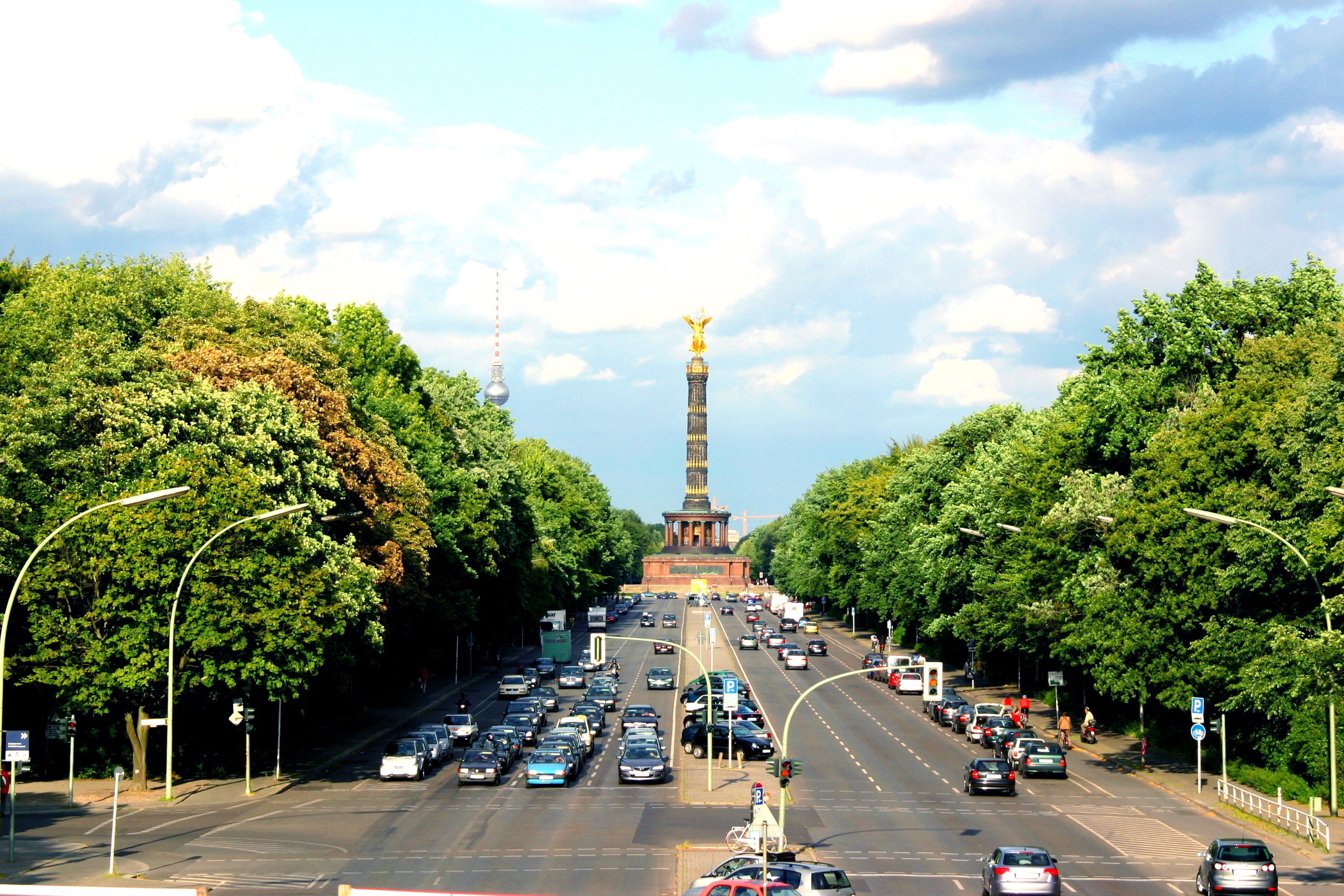 Straße des 17. Juni (Klopstockstraße - Großer Stern) and Berliner Siegessäule